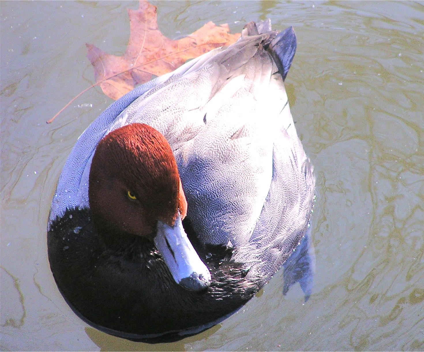 Amerikaanse tafeleend, eigen foto Va Beach aviary aquarium